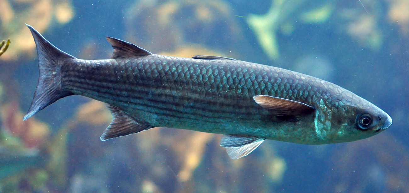 Liza saliens